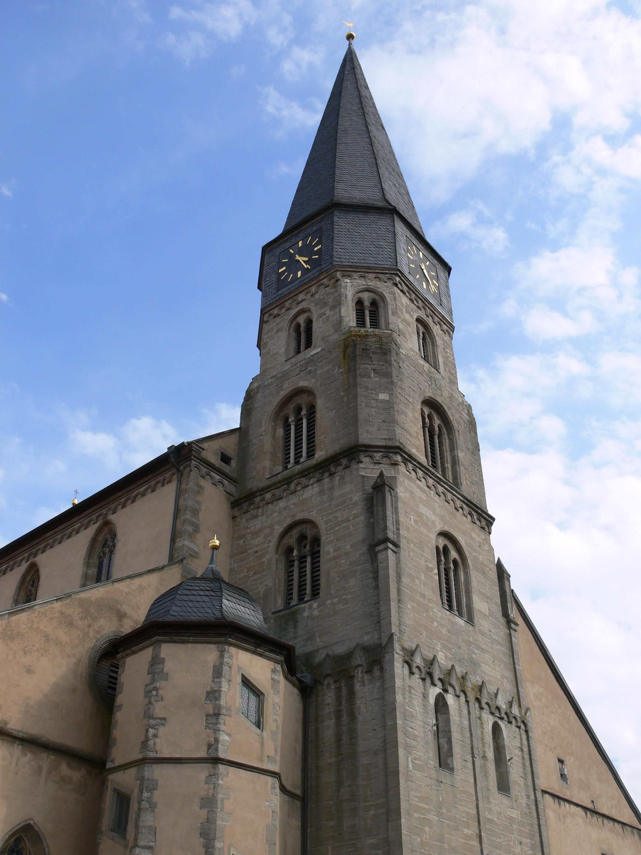 Stadtpfarrkirche St. Maria Magdalena, Münnerstadt